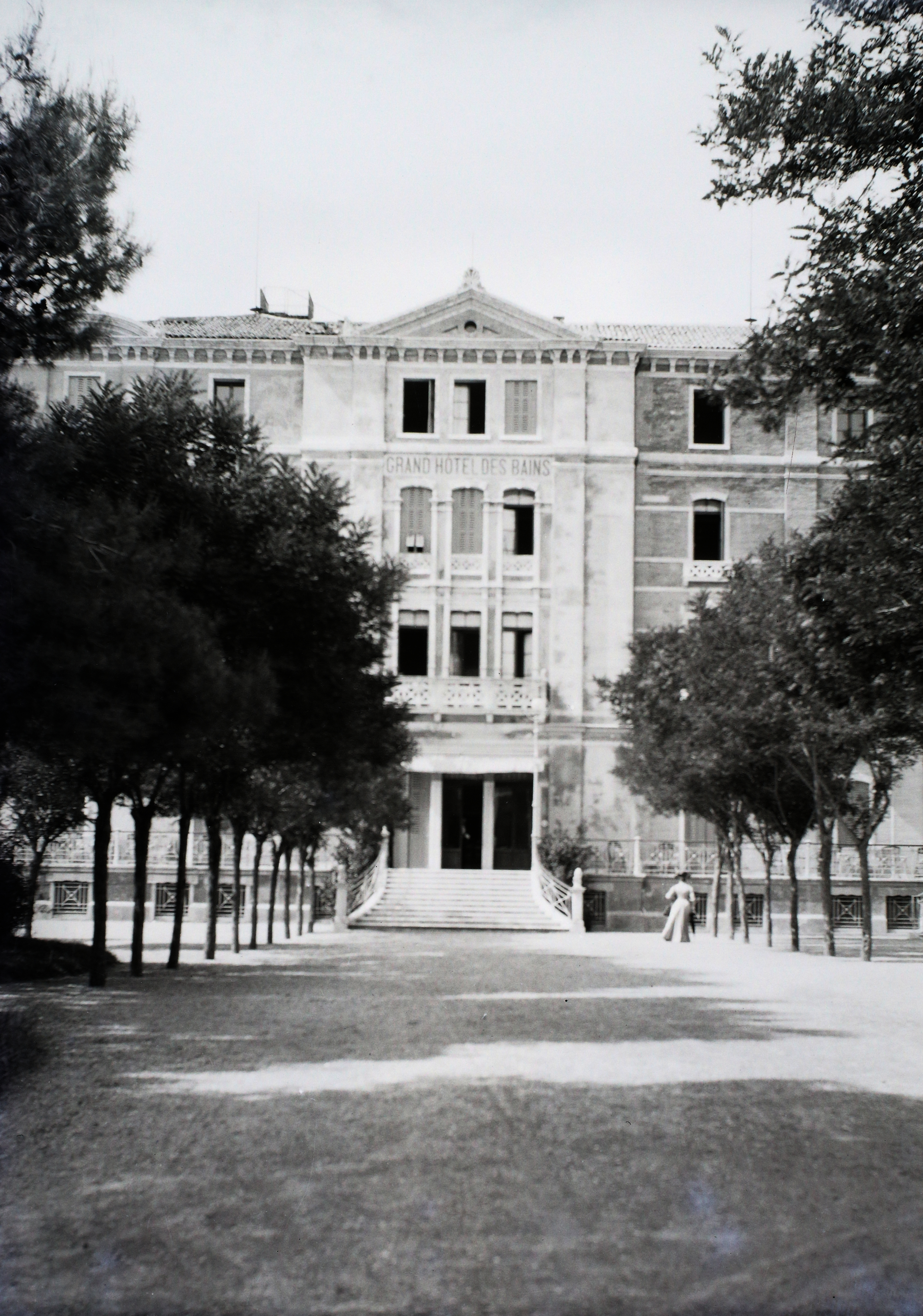 Lido, Grand Hotel des Bains. Location: Italy, Venice Title: Lido, Grand Hotel des Bains.